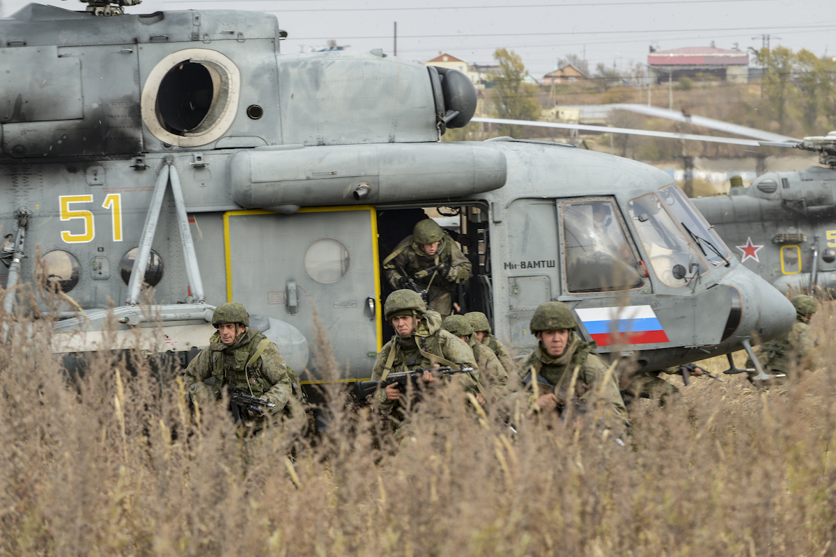 Активная фаза тактического учения с соединением ВДВ в Уссурийске.